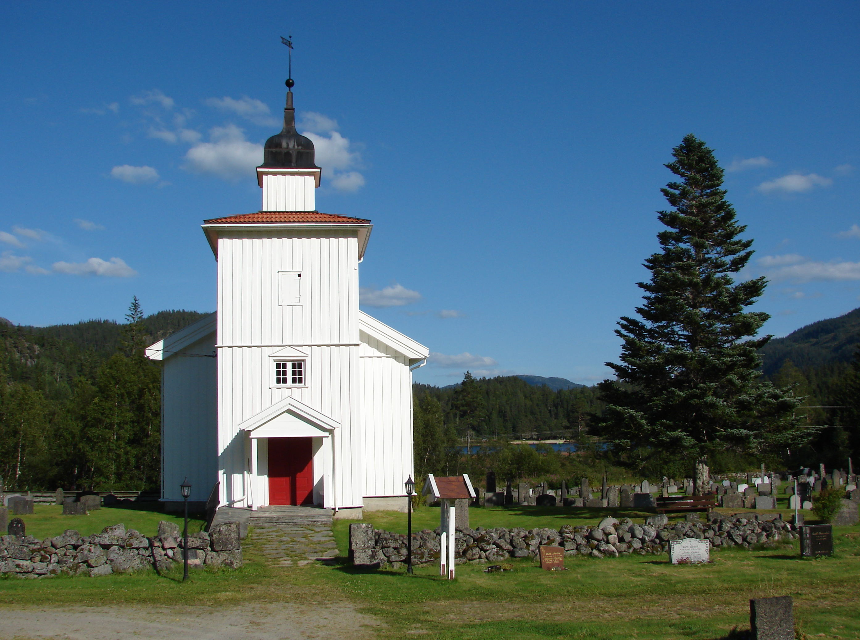 Mo Kirke, Telemark